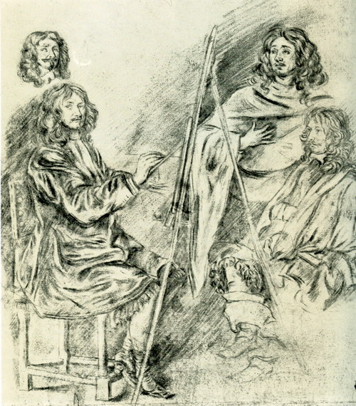 Брати Ленен. малюнок